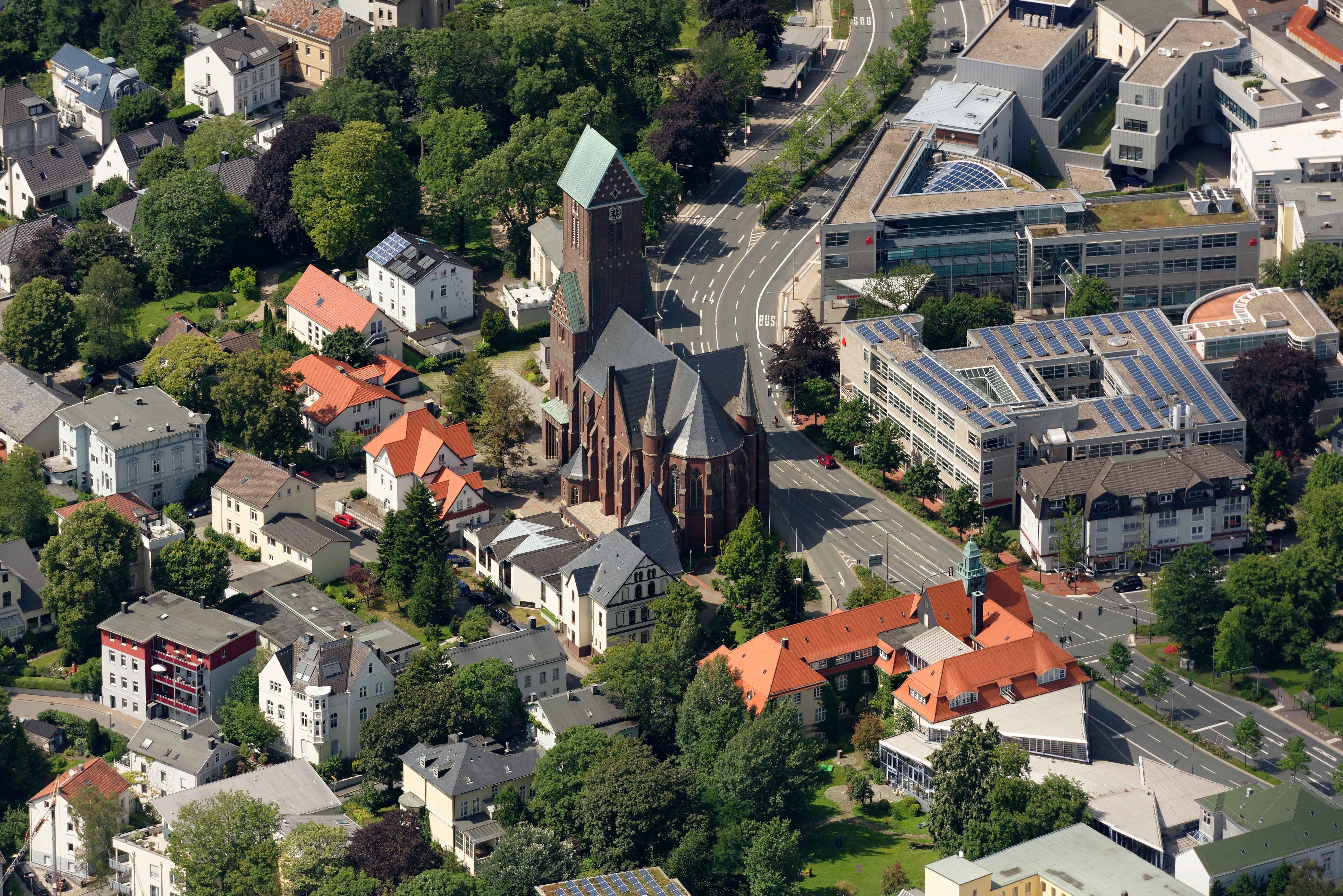 Luftaufnahme: Lüdenscheider Ortszentrum mit dem Geschichtsmuseum der Stadt Lüdenscheid, St. Joseph und Medardus und der Sparkasse Lüdenscheid, Landesstraße 530, Nordrhein-Westfalen